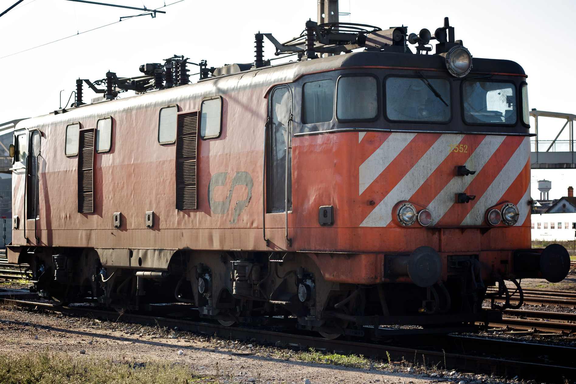 Local: Estação do Entroncamento [Linha do Norte, PK 106 • Linha da Beira Baixa, PK 106] Data e hora: 20 de Dezembro de 2008 [15h17] Material: Locomotiva 2552 [Groupement 50 Hz - Alsthom / Henschel / Sorefame]